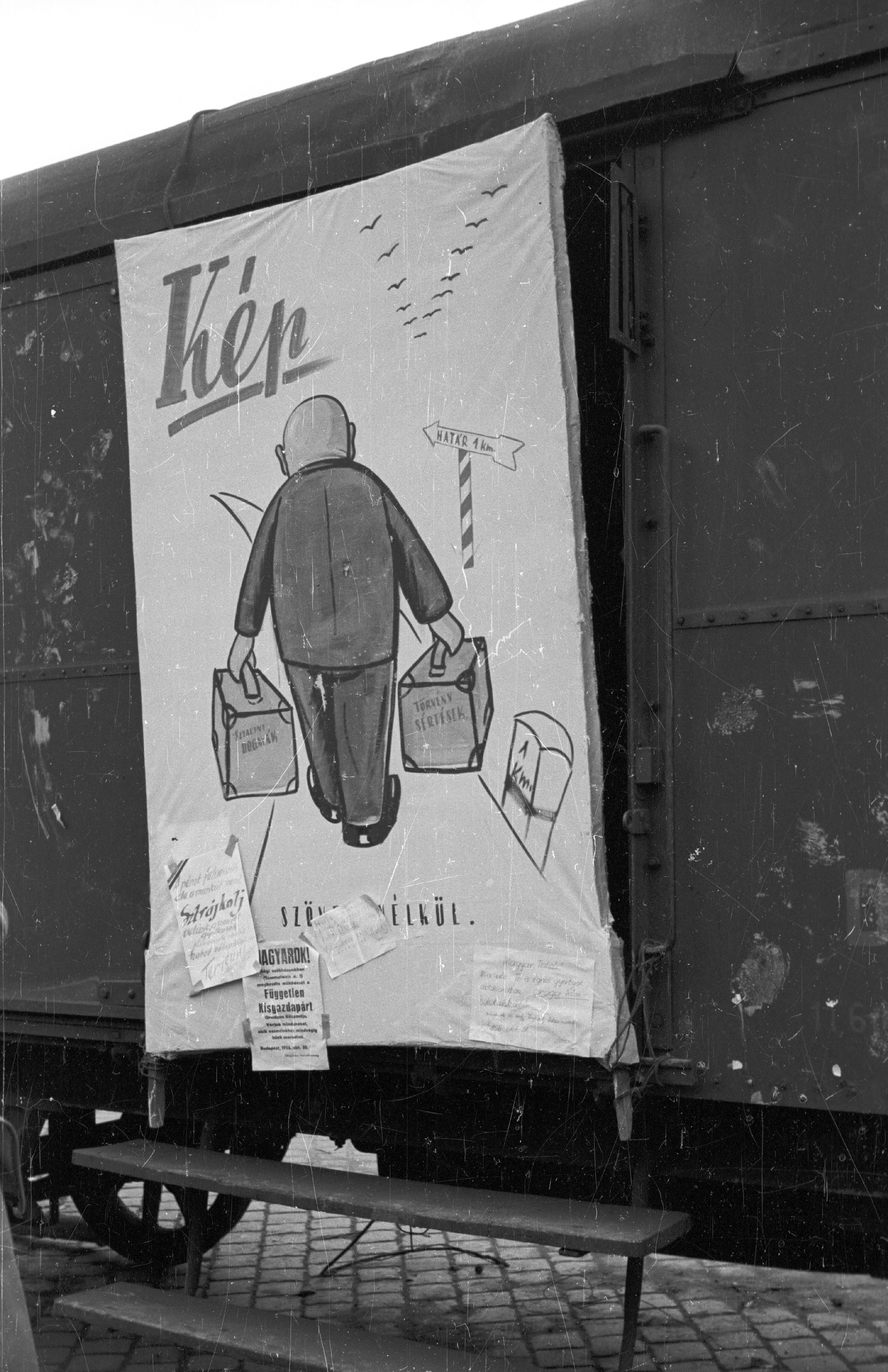 Vagonra ragasztott karikatúra a Széna téren. Location: Hungary, Budapest II. Tags: coach, caricature, board, revolution, Budapest Title: Vagonra ragasztott karikatúra a Széna téren.